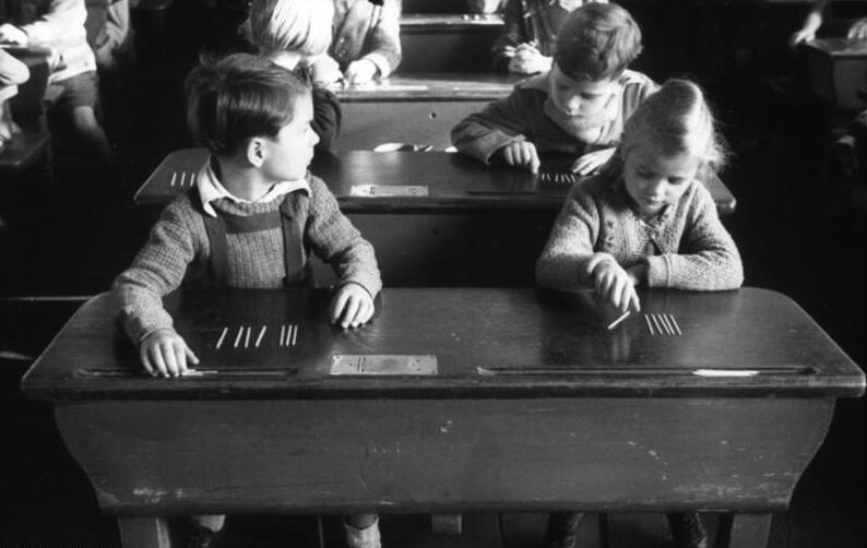 ADN-ZB Kümpfel Berlin 1949: "Tag der offenen Türen" Anläßlich der Volksbildungswoche fand in den Berliner Schulen ein Tag der offenen Schultür statt. Die Bevölkerung, vor allem die Eltern, hatten Gelegenheit dem Unterricht beizuwohnen. -In der 14. Volksschule in der Prenzlauer Allee. Die Schulanfängerklasse von Fräulein Häuer. UBz.: Rechenstunde mit Stäbchen bei den Schulanfängern der 14. Schule Prenzlauer Berg in der Prenzlauer Allee. 4050-49